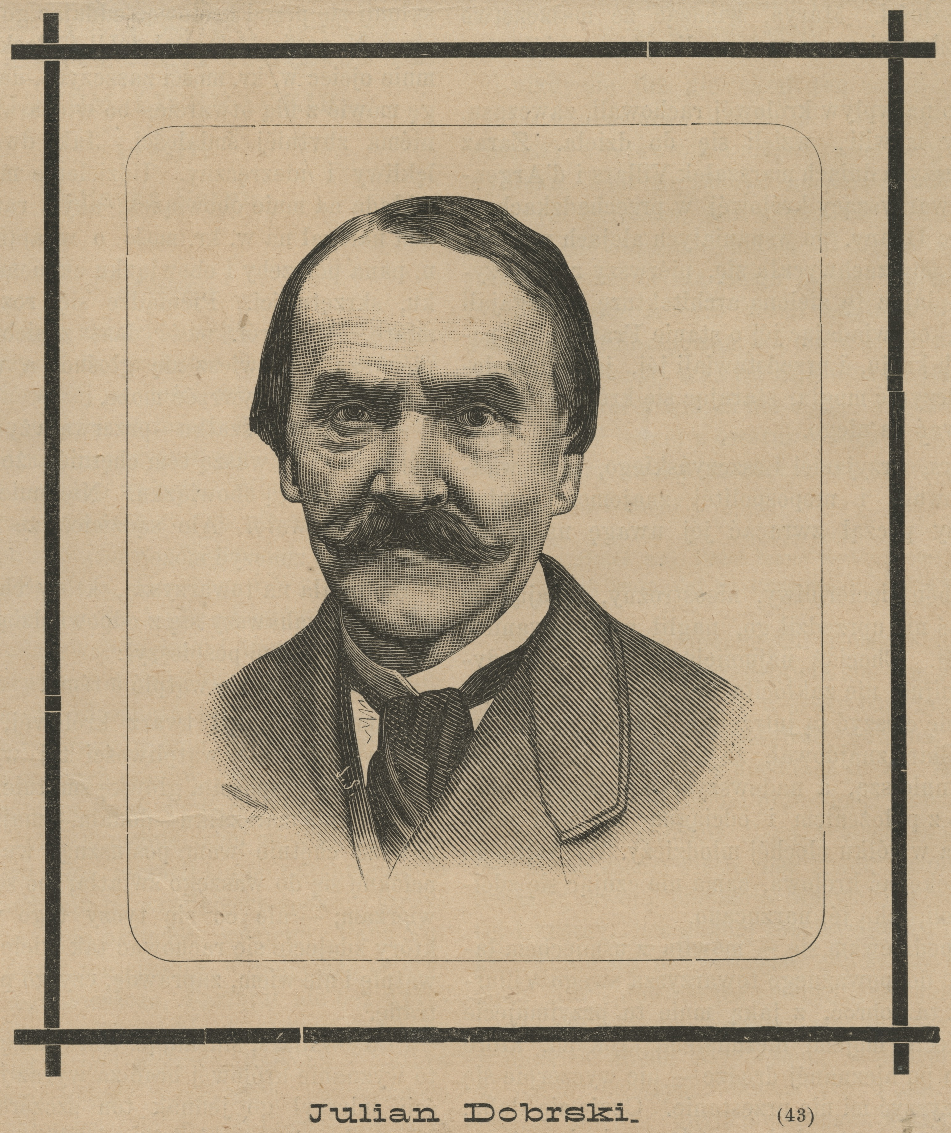 Julian Dobrski